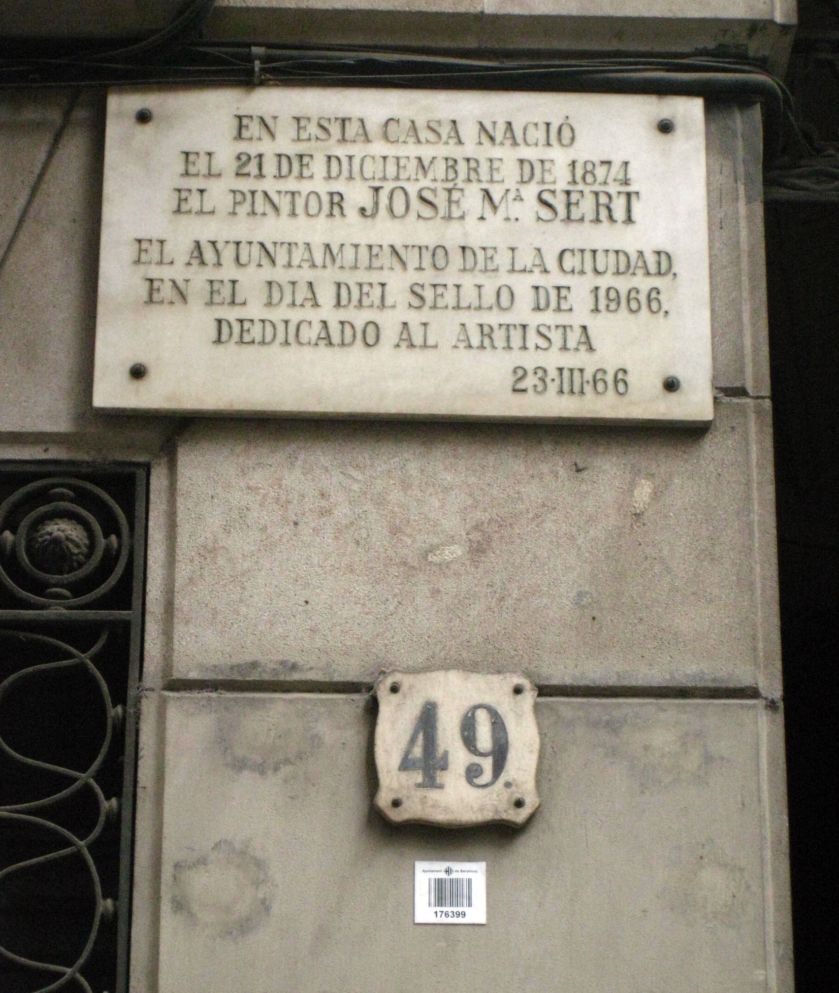 Josep Maria Sert. C. Sant Pere Més Alt, 49 (Barcelona)